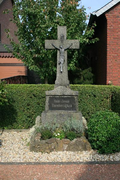 Dorfkreuz in Wegberg-Brunbeck